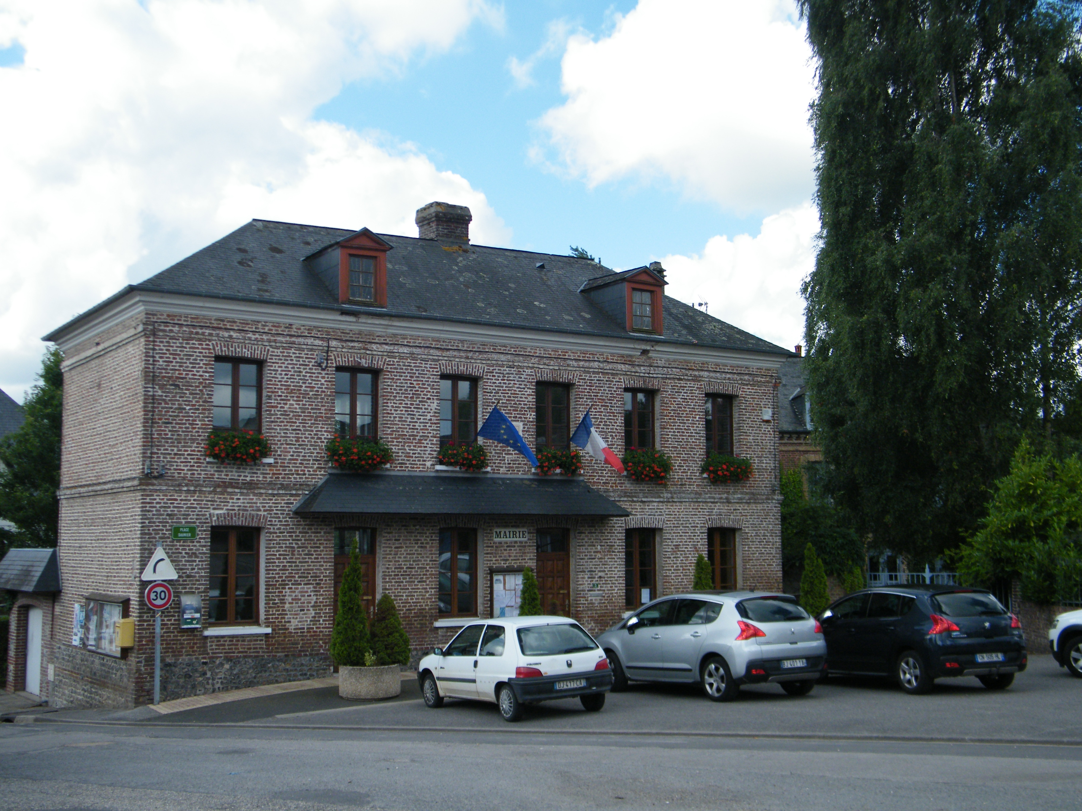 Bellengreville, Seine-Maritime, France, mairie